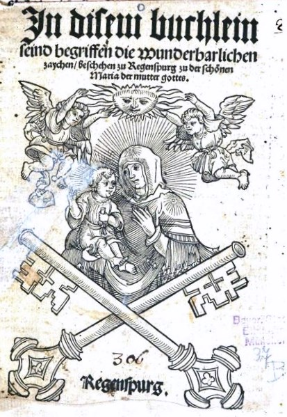 Titelseite der Hubmaier-Schrift In disem Buchlein seind begriffen die wunderbarlichen Zaychen beschehen zu Regensburg zu der schönen Maria der Mutter Gottes